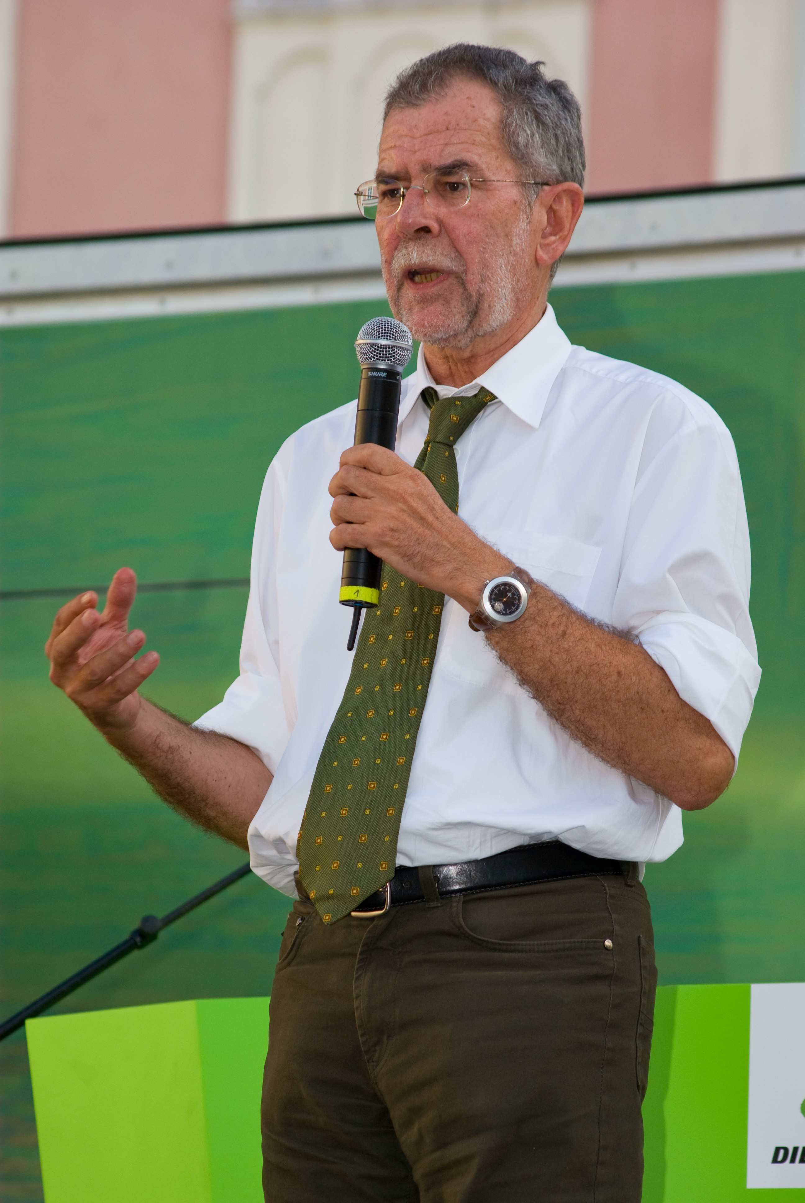 Der österreichische Politiker Alexander Van der Bellen bei einer Wahlkampfveranstaltung der Grünen am 11. September 2008 in Sankt Pölten.